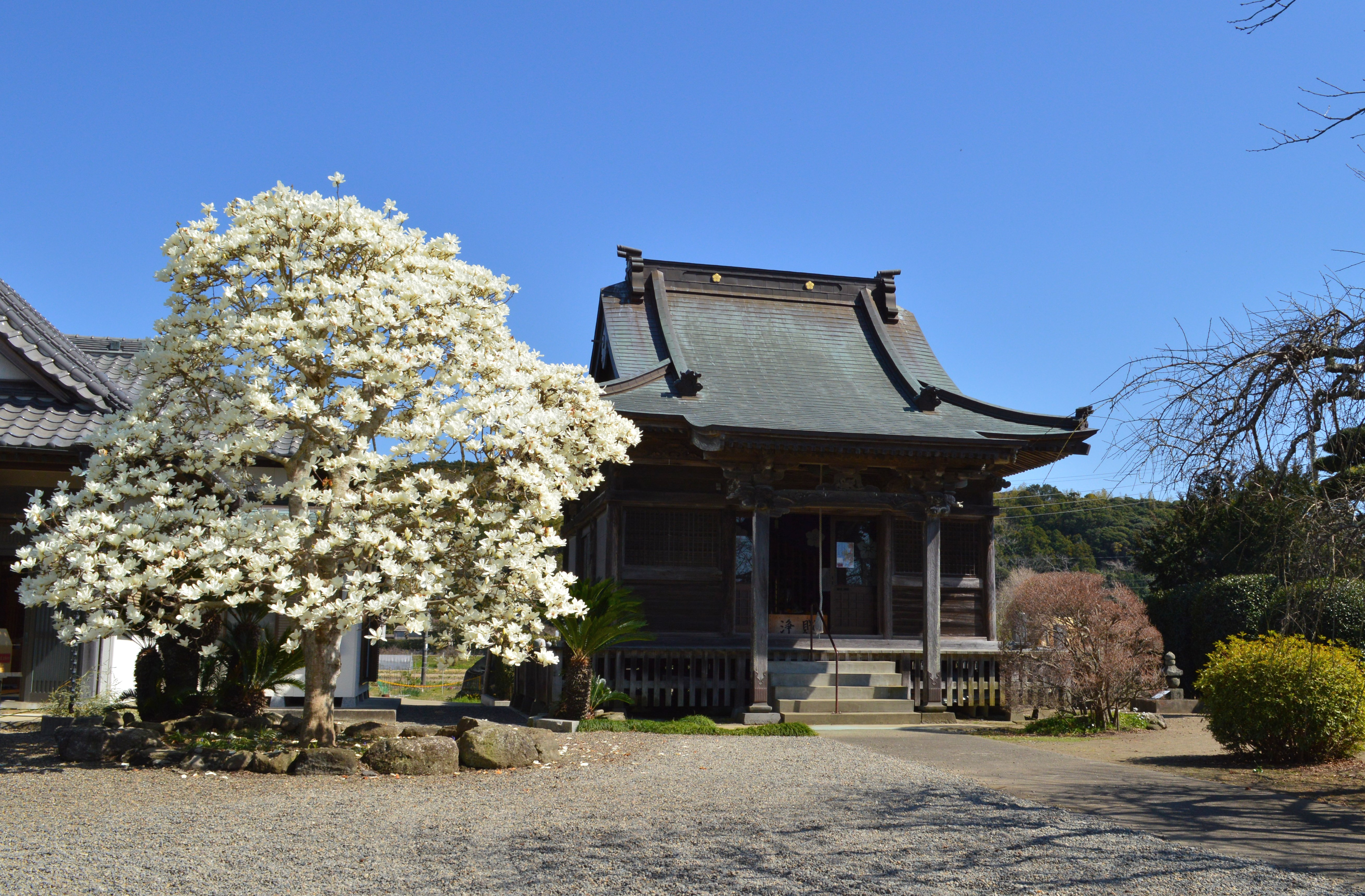 安房国分寺 本堂（薬師堂）